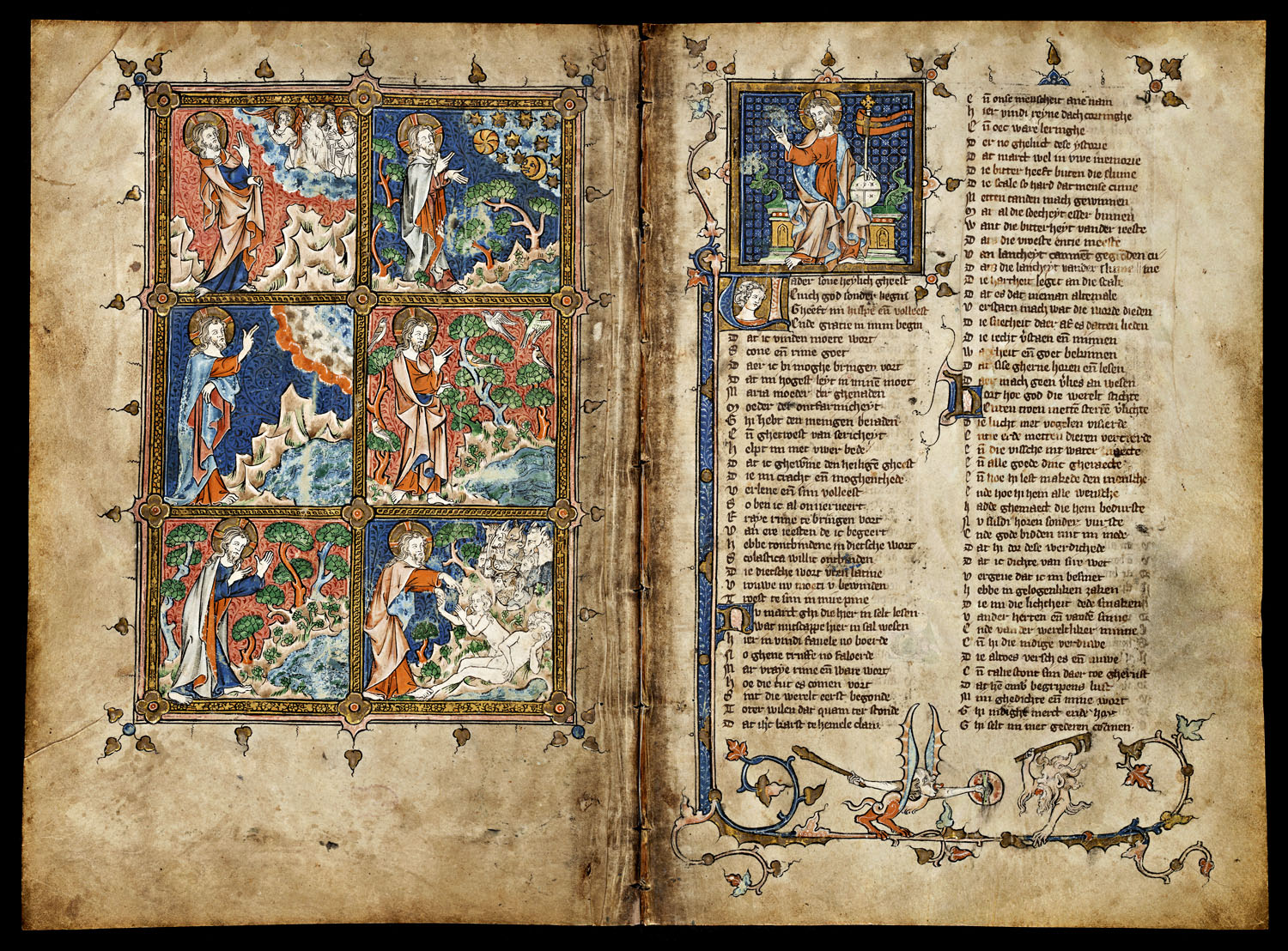 Maerlant Rijmbijbel "Het exemplaar van het Museum Meermanno-Westreenianum in Den Haag (10 B 21) werd in 1332 te Utrecht voltooid. "